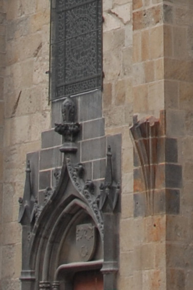 Notre-Dame du Port, Spuren des ehem. got. Kreuzgangs